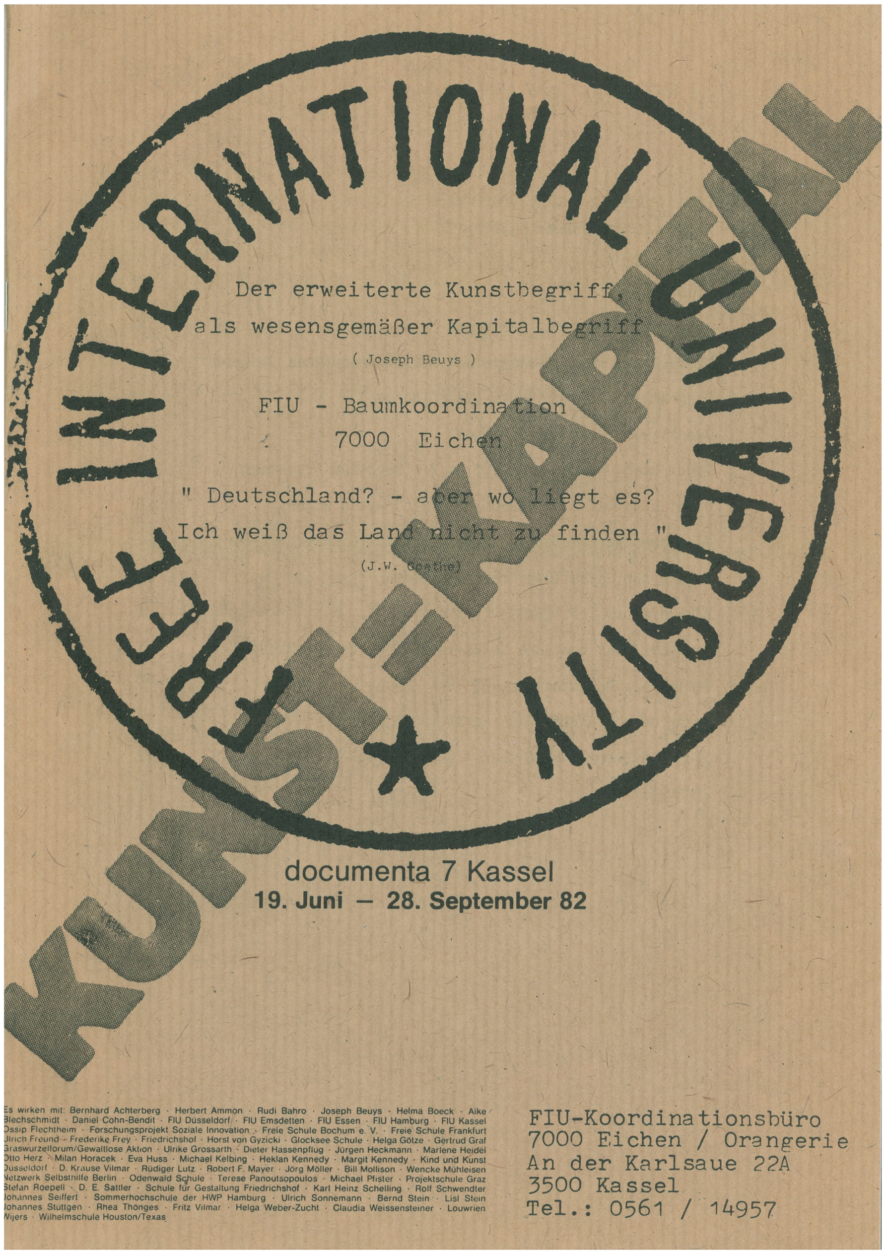 documenta 7 Free International University Beuys Veranstaltungskalender Foto des Titelblatts